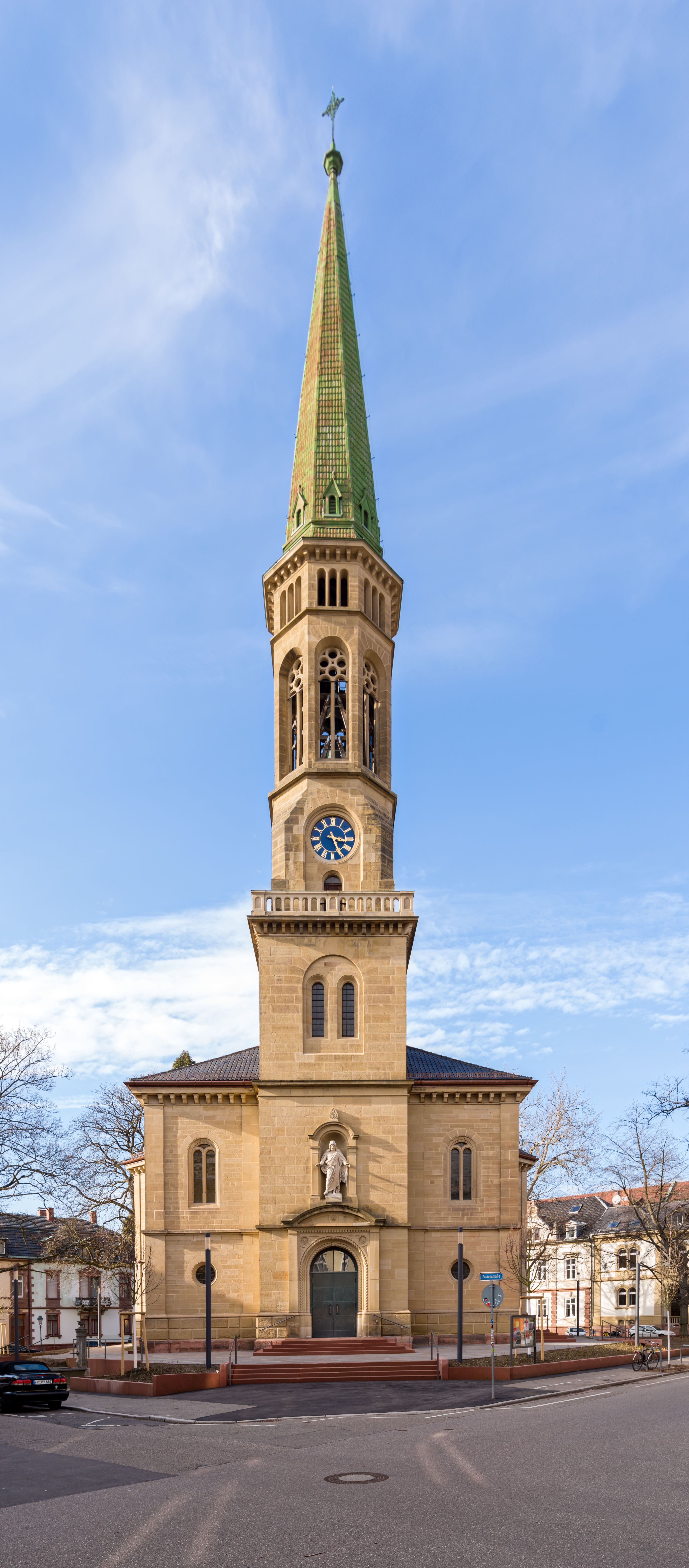 Bilder aus Freiburg im Breisgau DIe Kiche nach der Renovierung